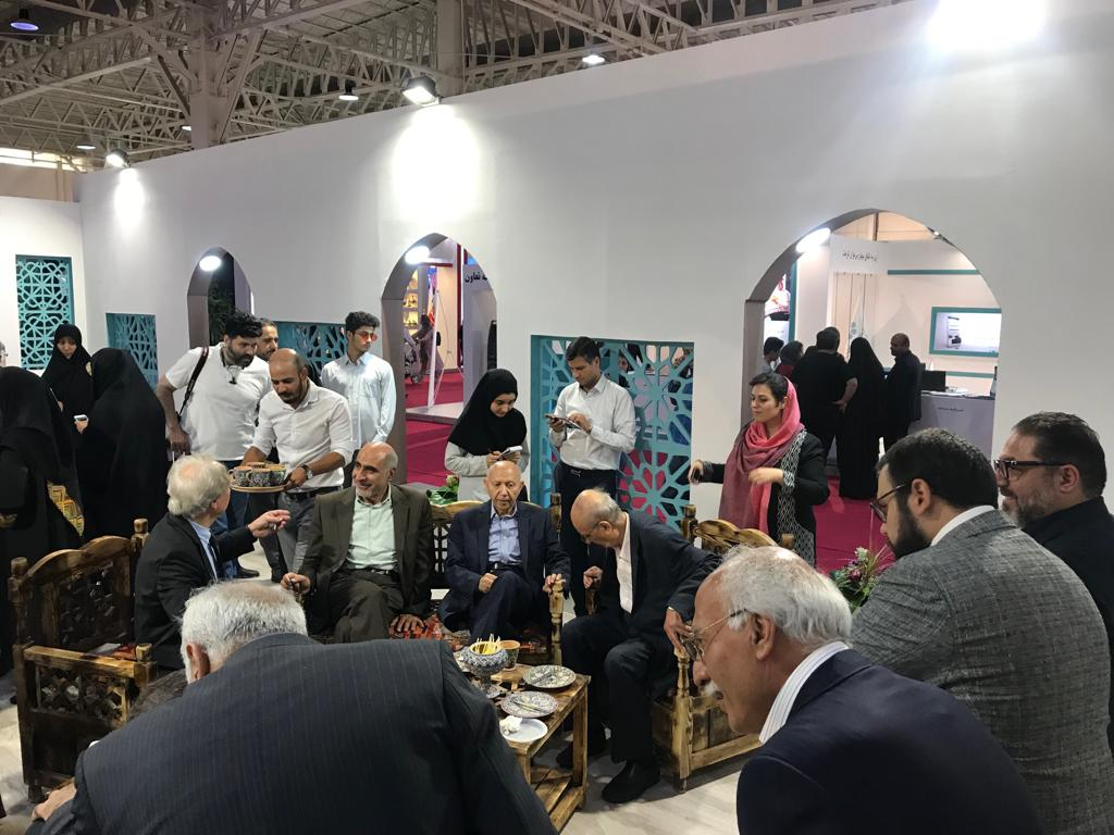 دکتر الهی قمشه ای و استاد الیاسی